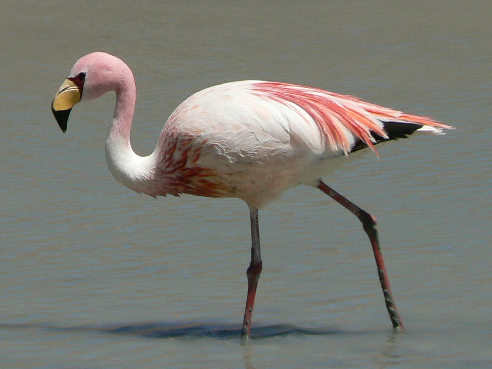 James's Flamingo (Phoenicopterus jamesi)